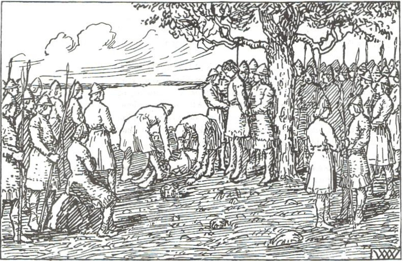 Wilhelm Wetlesen: Illustration for Magnus Berrføtts saga, Heimskringla 1899-edition. nn: «Egil vert hengd.»